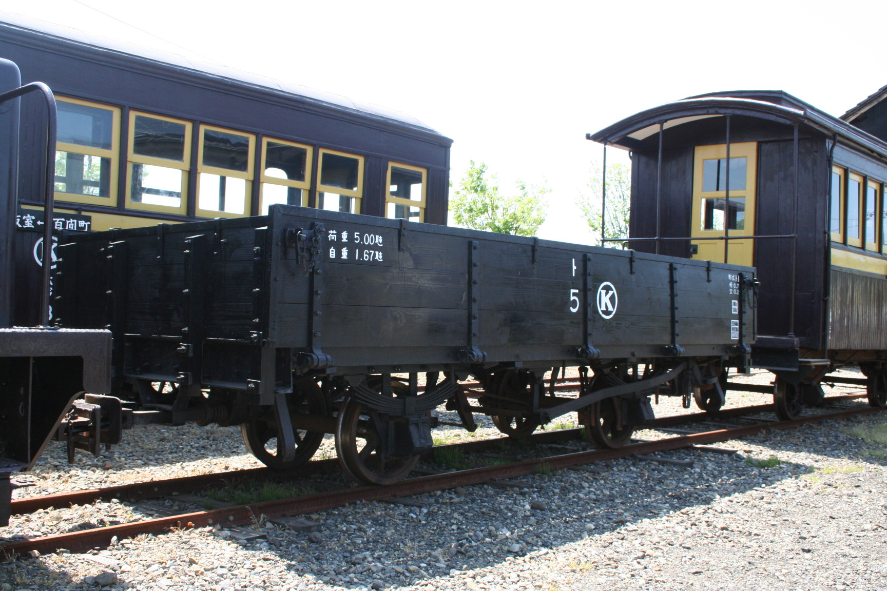 2018年5月5日撮影